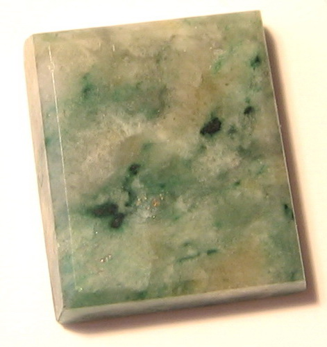 Таблитчатый кабошон из лиственита.